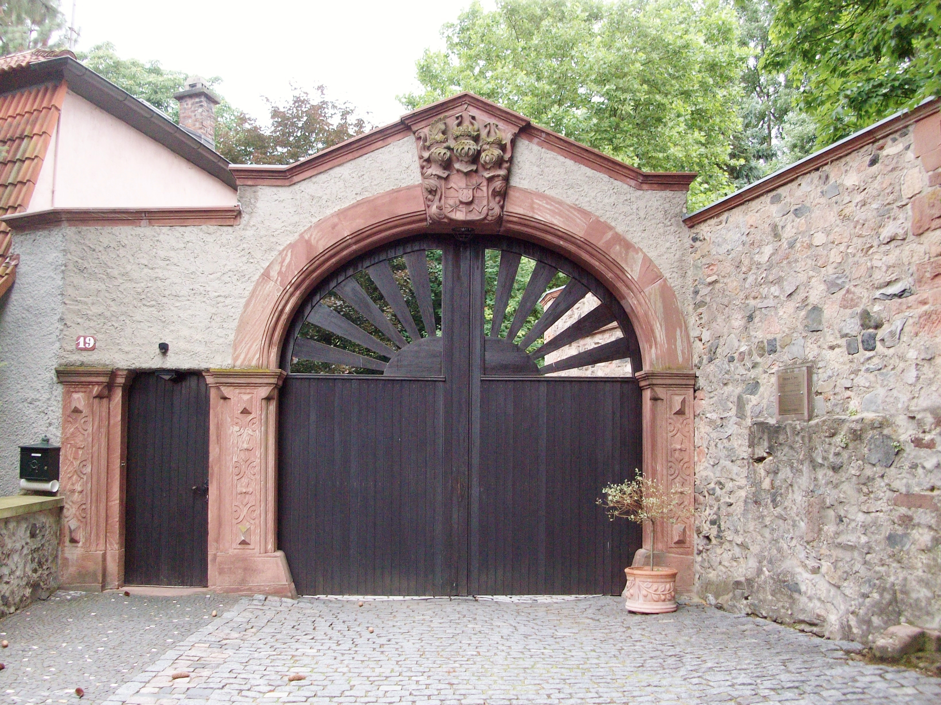 Das Eingangstor zum Schloss Ernsthofen